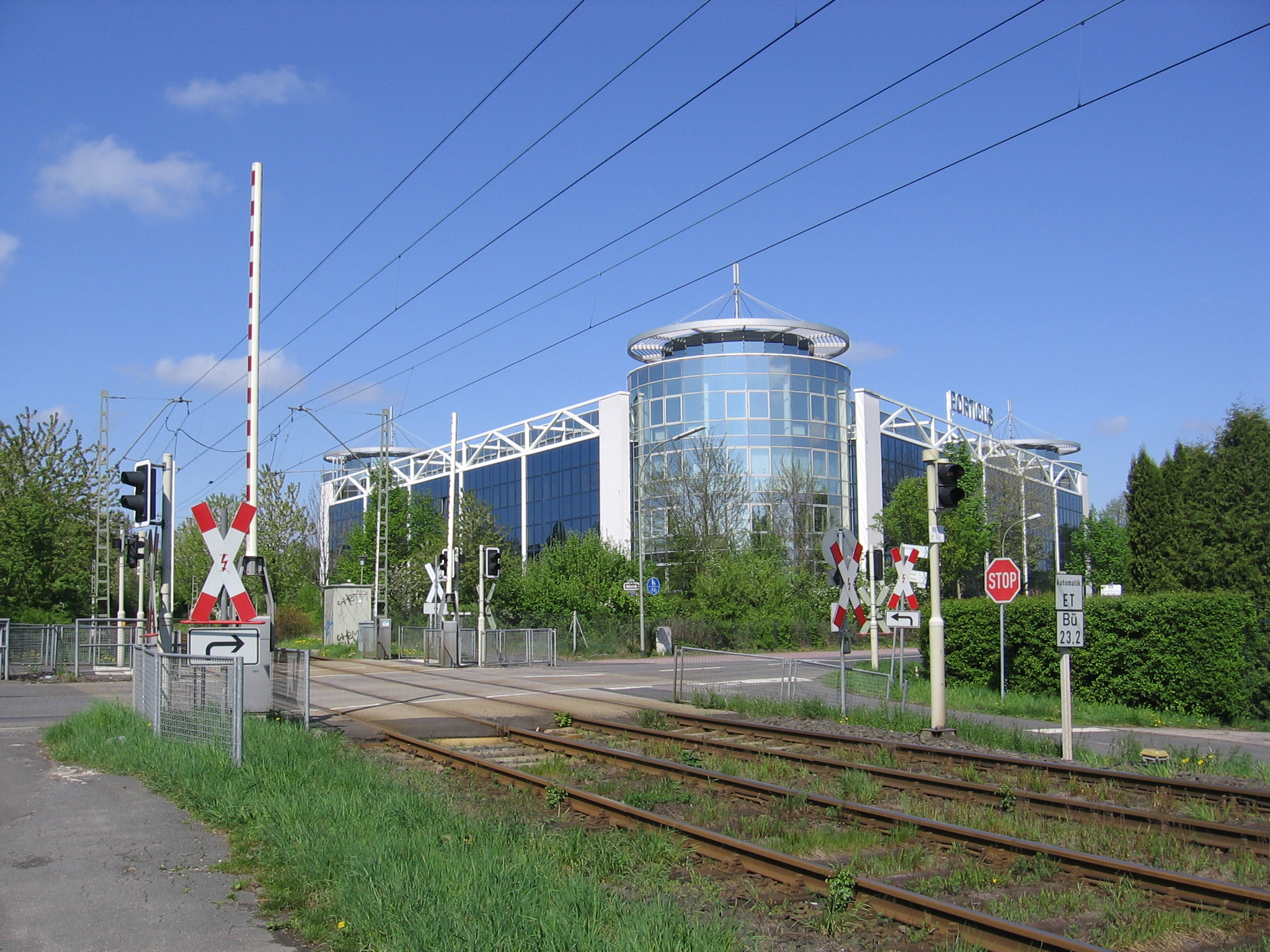 Bahnübergang mit Gefahrenraum-Freimeldeanlage an der U2 in Ober-Eschbach am Ortsausgang